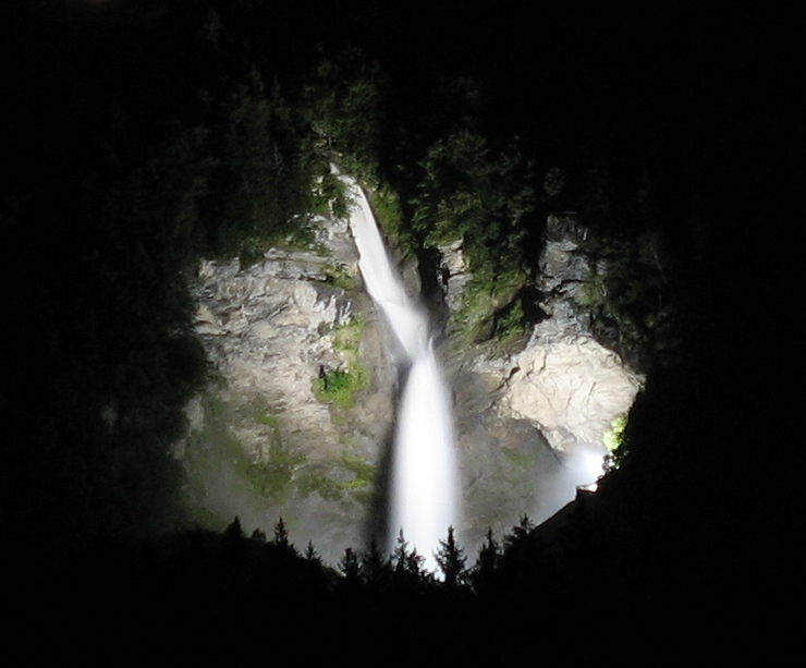 Reichenbachfall bei Nacht.